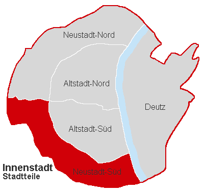 Lagekarte Neustadt-Süd im Stadtbezirk Köln-Innenstadt